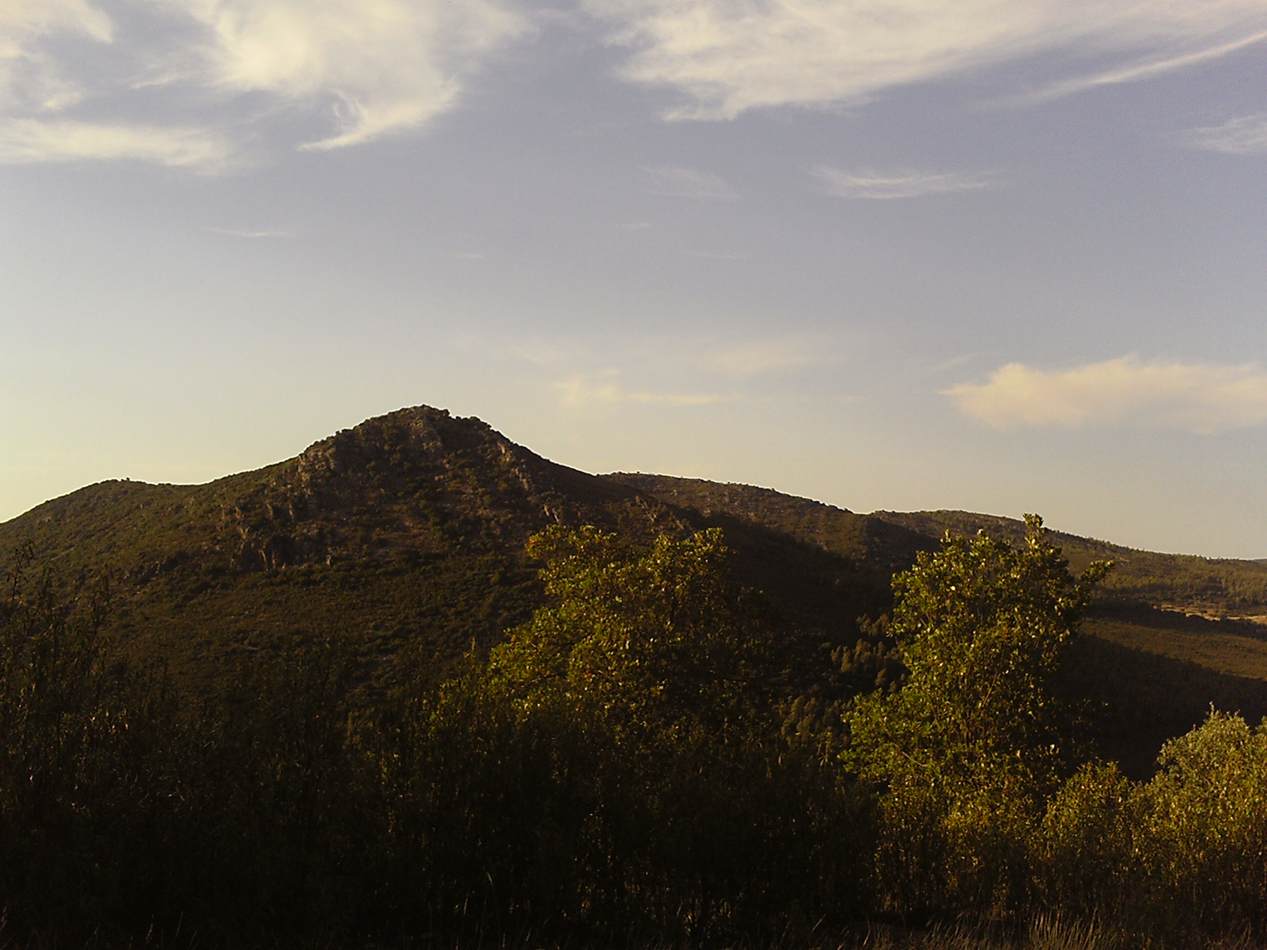 Reserva Regional de Cijara